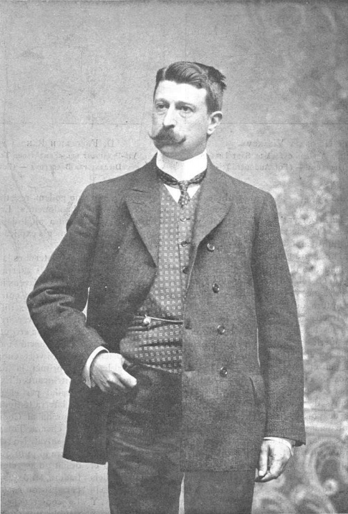 Fotografía de Albert Rusiñol, presidente de la Lliga Regionalista y diputado por Vich, obra de Pablo Audouard.